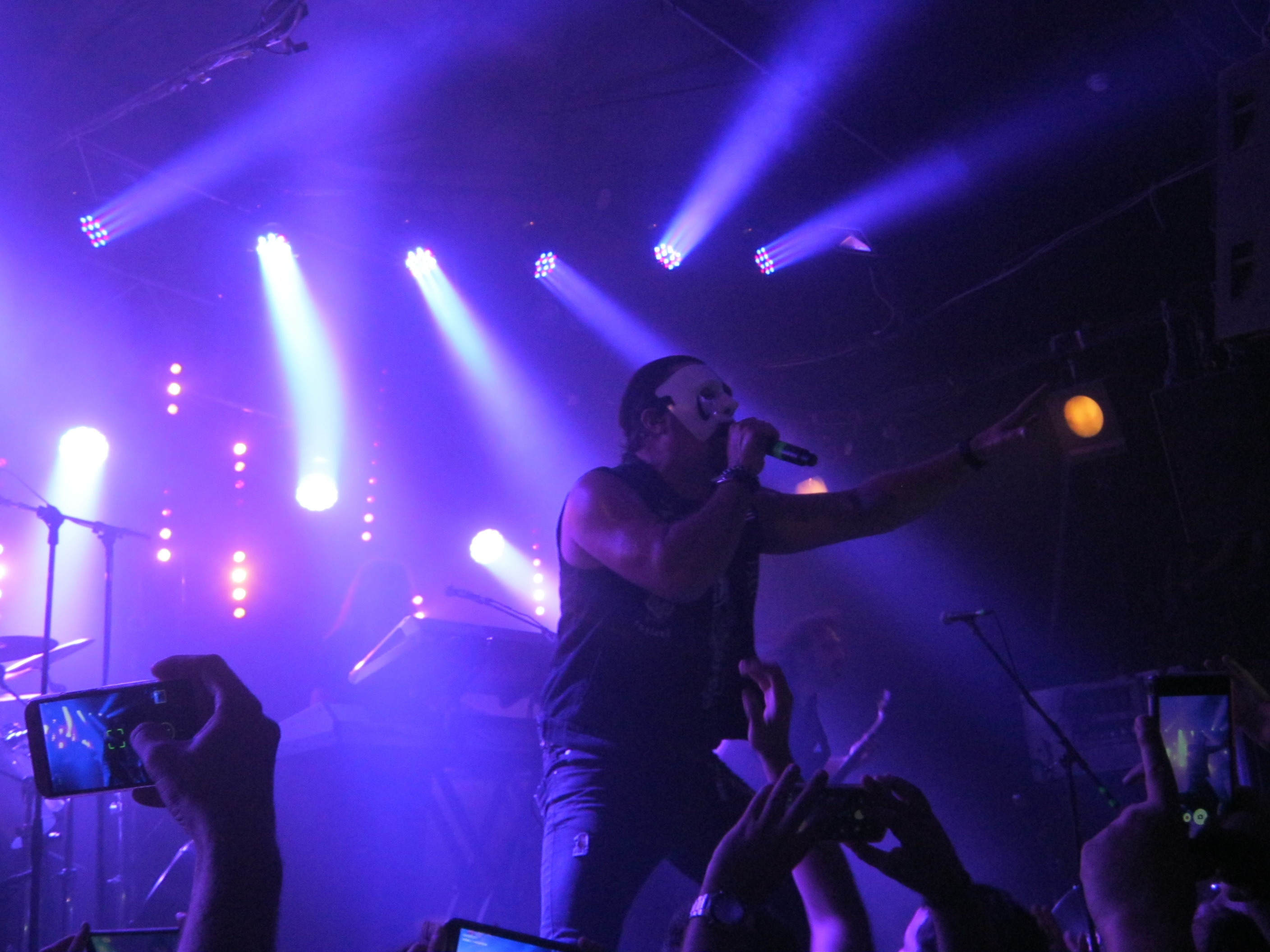 Symphony X at Israel. 10/08/16